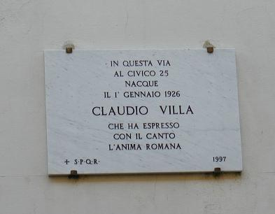 Roma , via della Lungara a Trastevere: memoria di Claudio Villa sulla casa dove nacque